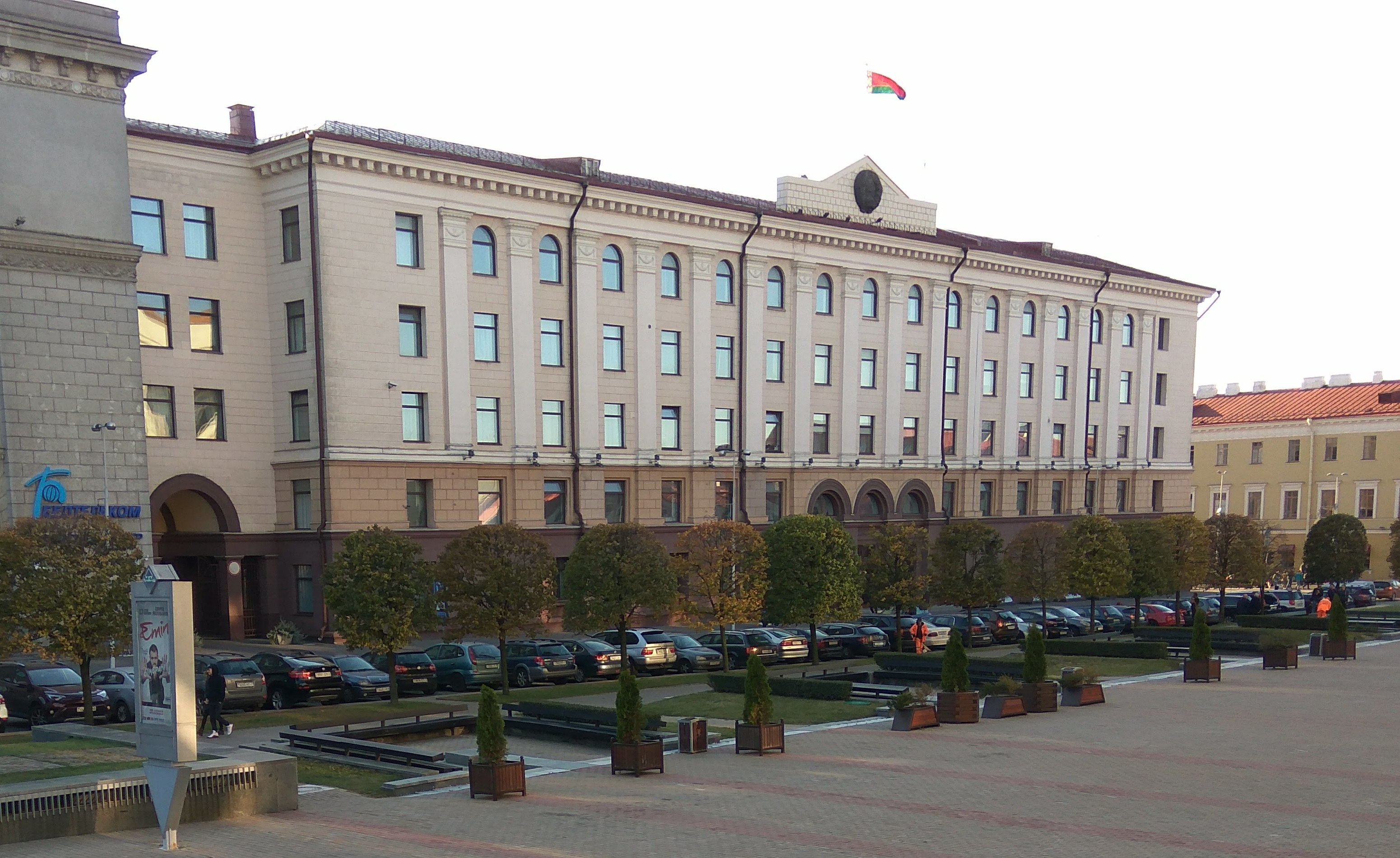 Мінск. Кастрычніцкая плошча (кастр. 2018)